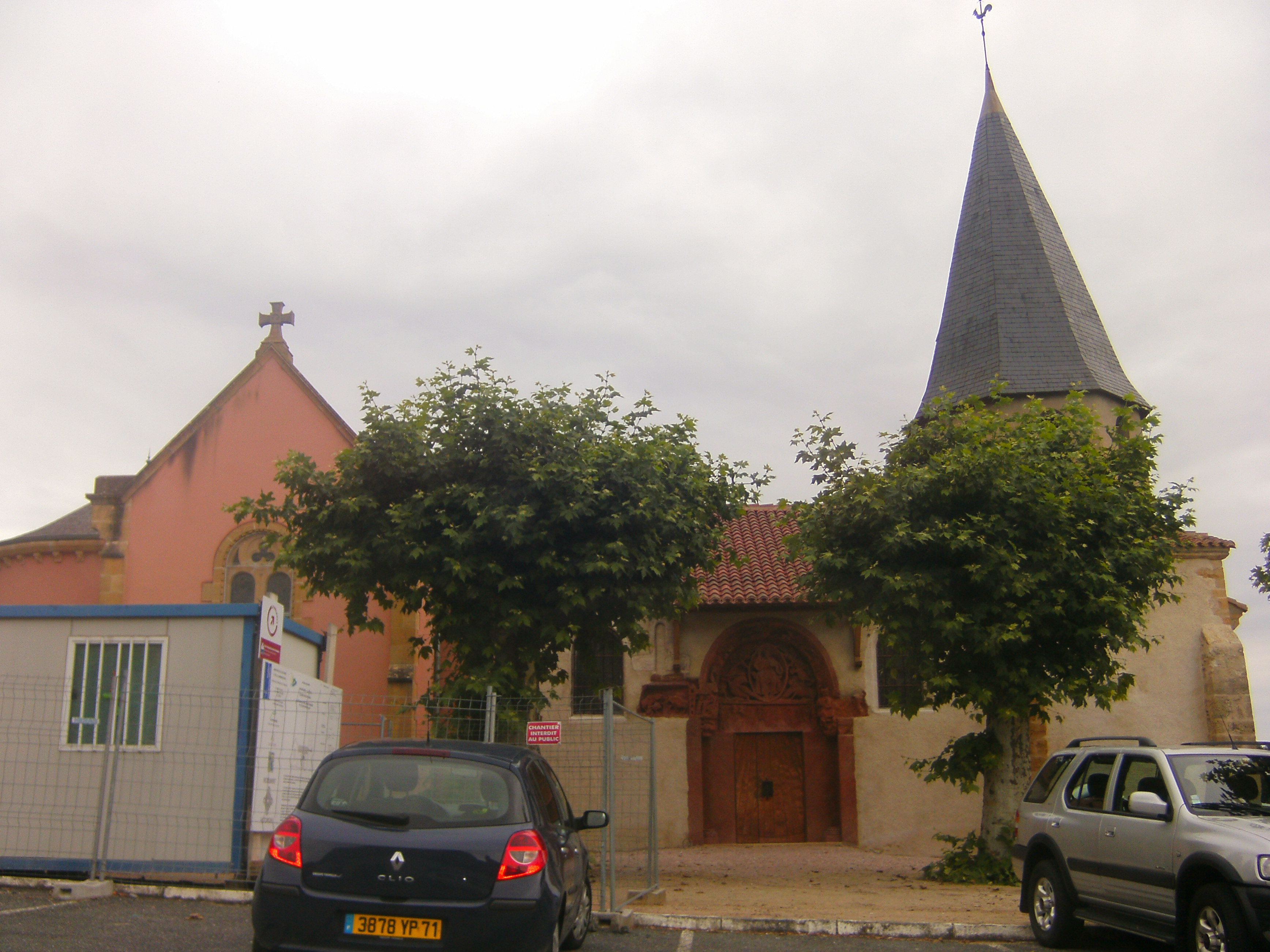 Eglise de Chassenard XIIe et XIXe siècle